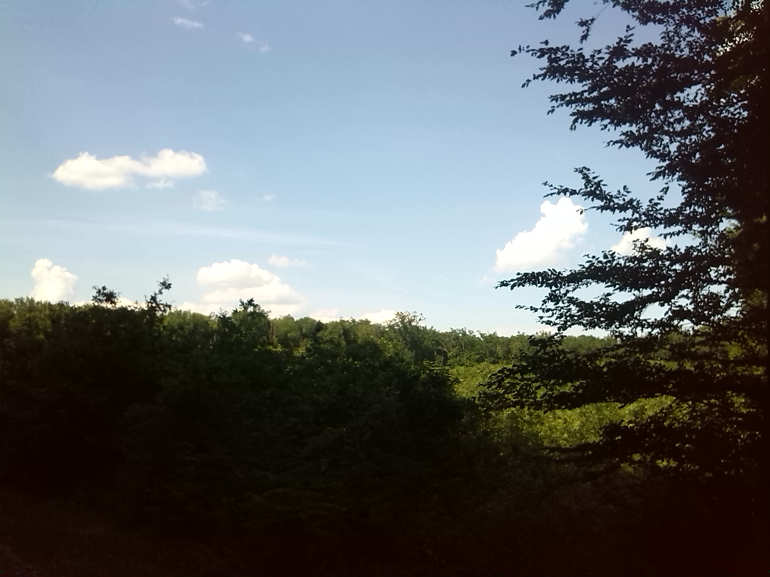 Budenečka šuma